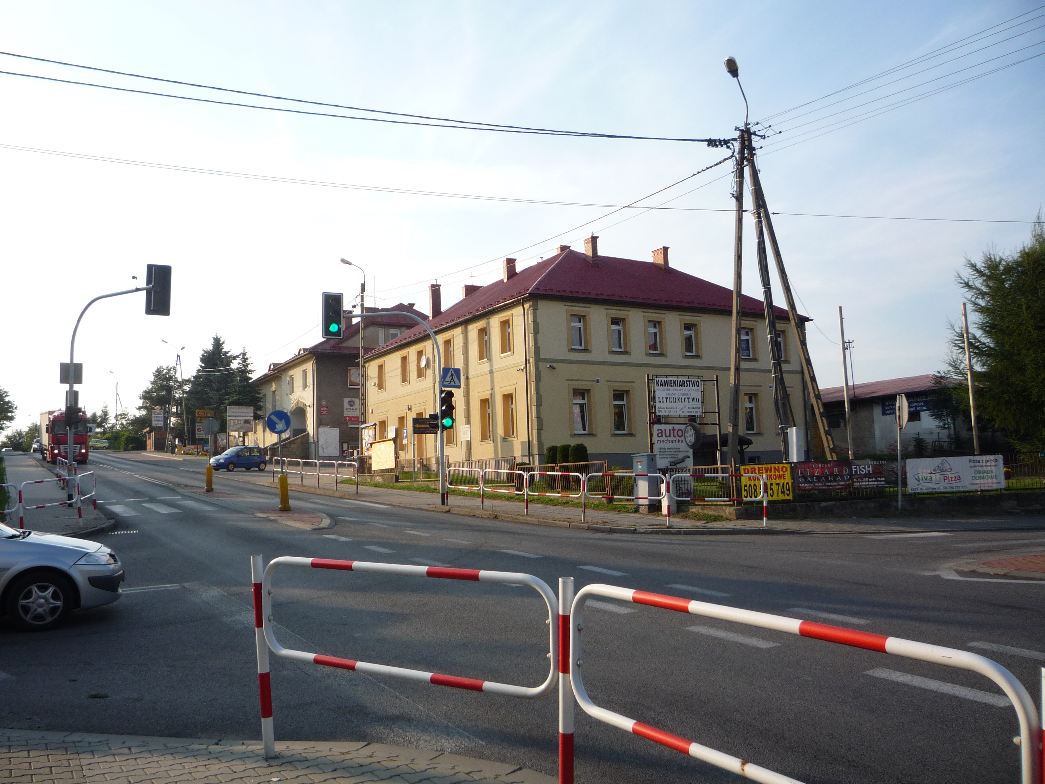 Skrzyżowanie ulic: Bielskiej, Szkolnej oraz Podlesie. Na zdjęciu widoczny jest Dom Kultury oraz budynek mieszczący przedszkole i punkt lekarski.